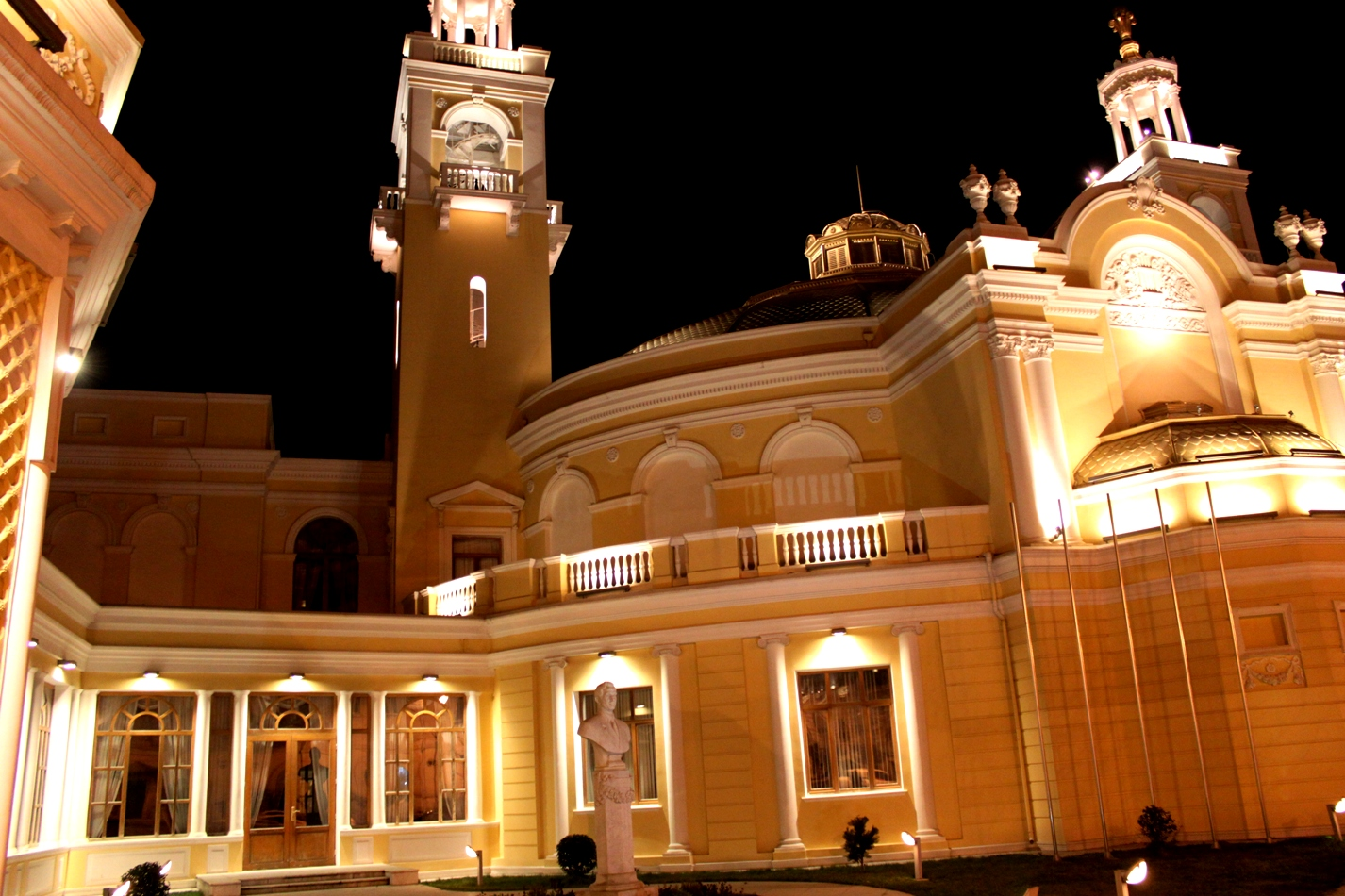 Бакинская филармония